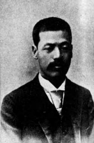 納所弁次郎